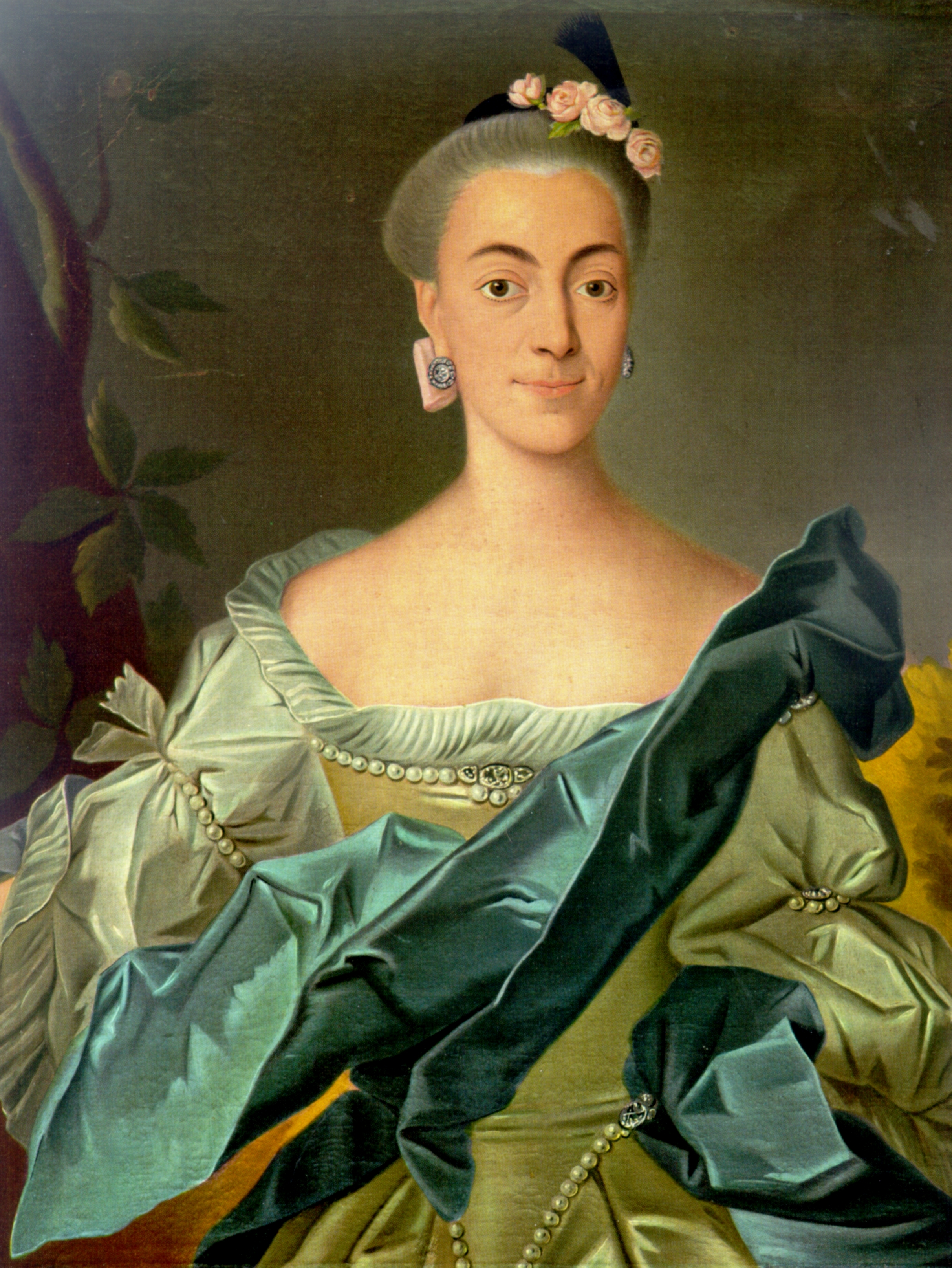 Portrait der Catharina Helena Dörrein. Ölgemälde von Friedrich Ludwig Hauck (1718-1801) aus dem Jahr 1761 im Besitz der Naturwissenschaftlichen Sammlung im Museum Wiesbaden